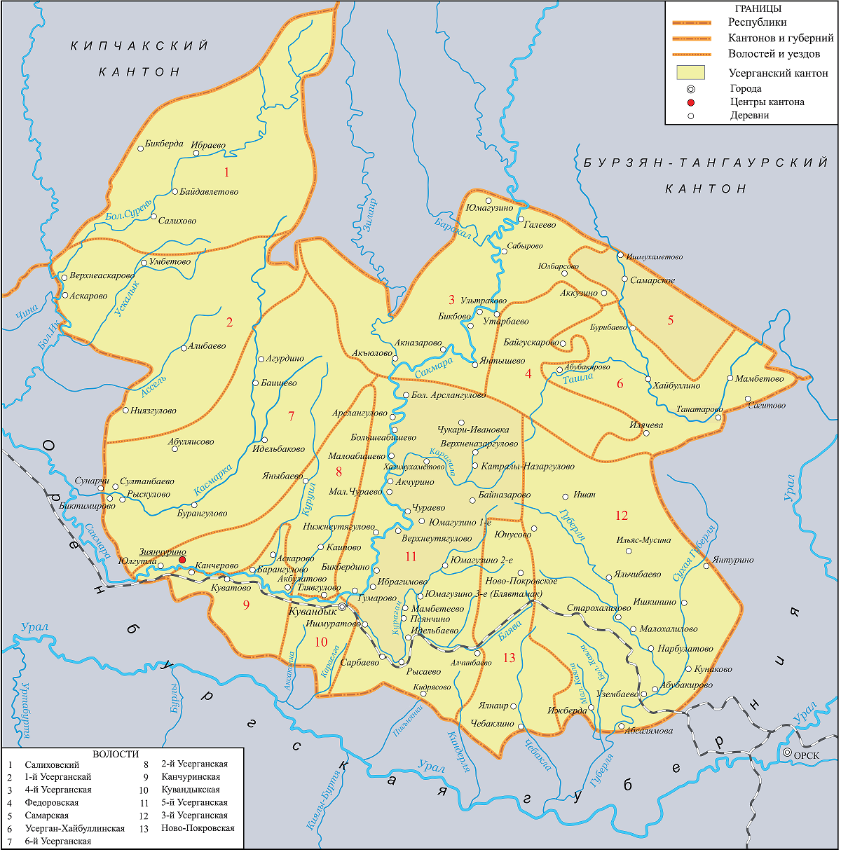 Карта Усерганского кантона БАССР. 1920 год